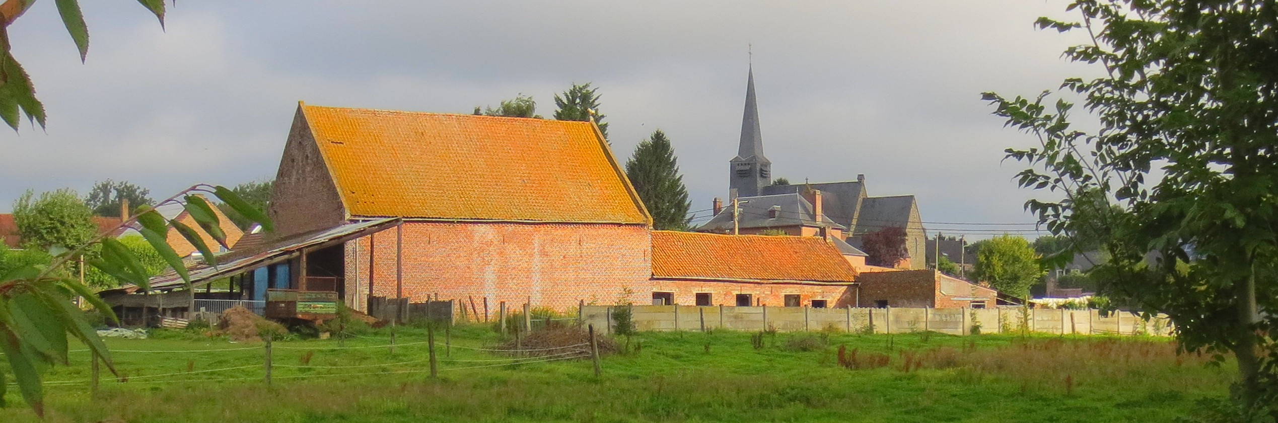 Wannebecq